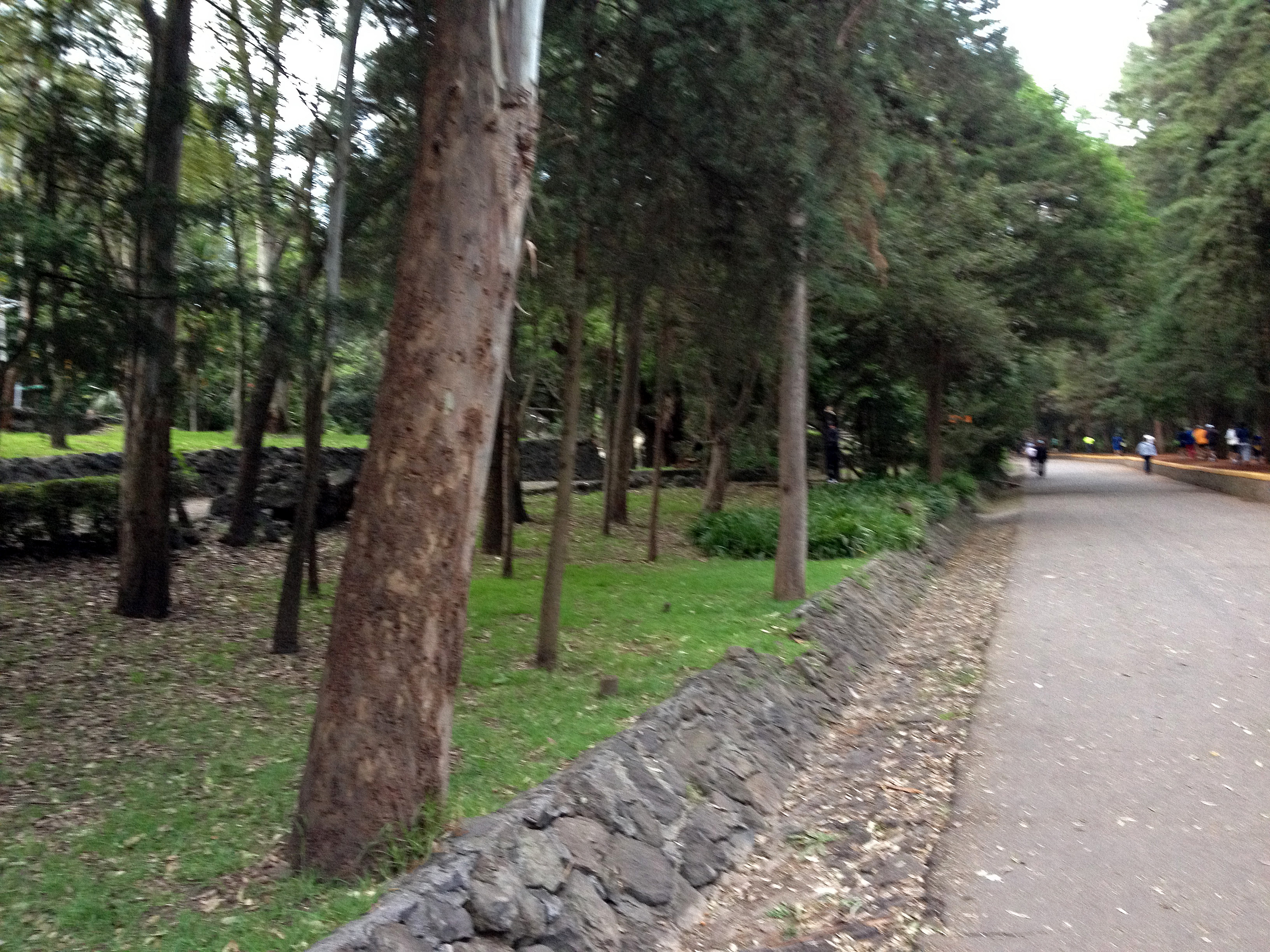 Circuito en forma de óvalo cerca de la entrada al Bosque de Tlalpan. Este circuito mide 889 metros.